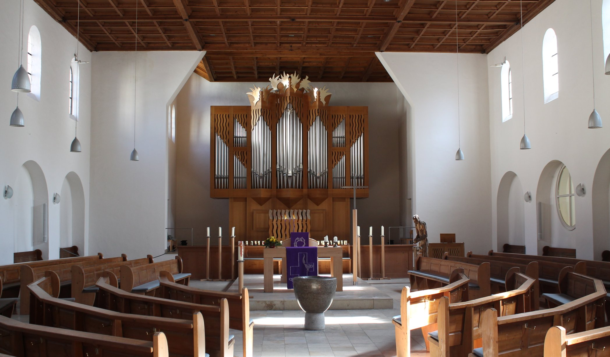 Orgel der Himmelfahrtskirche in München-Sendling (Eule op. 599, 1994, III/33)